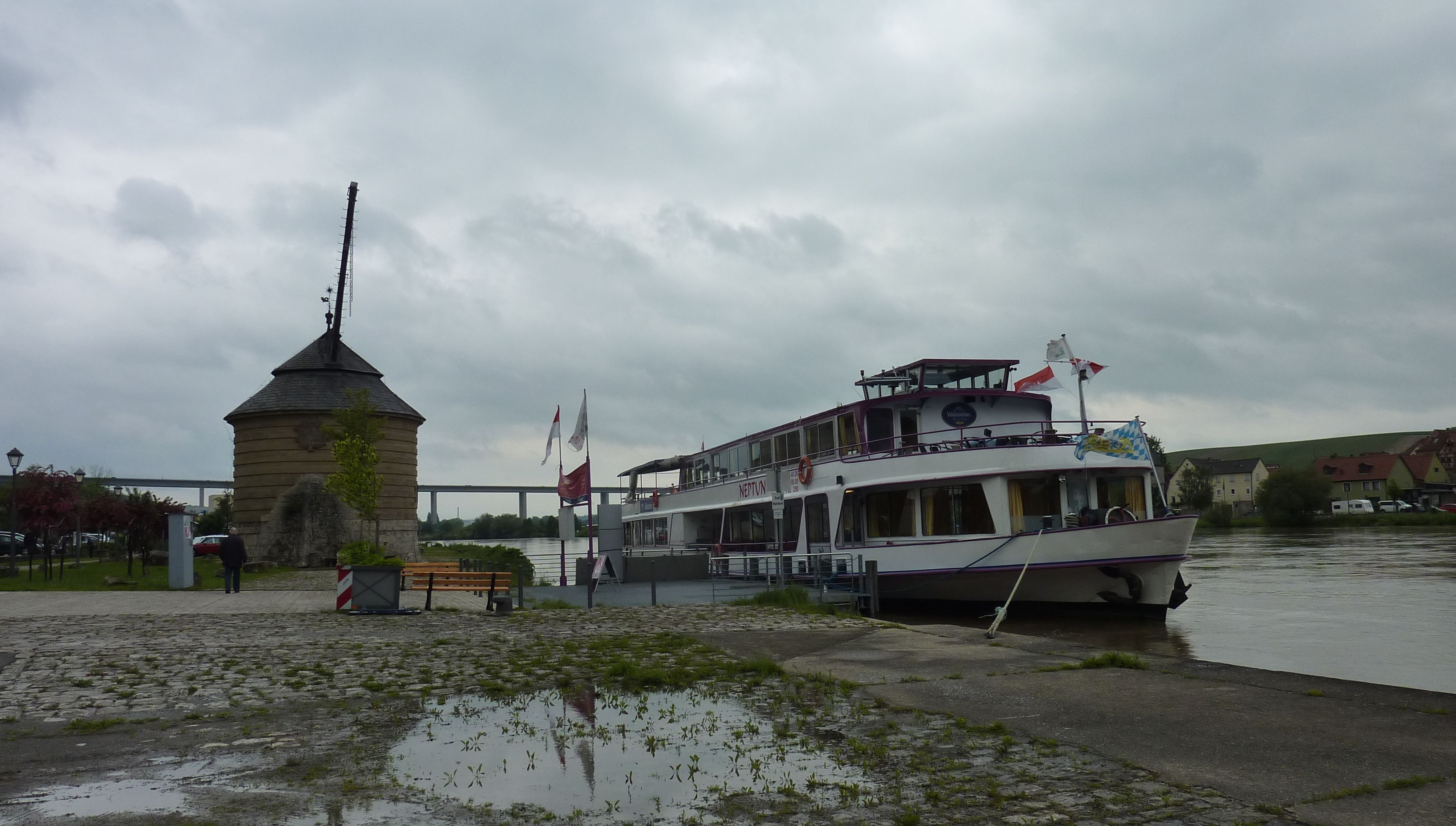 Alter Kran in Marktbreit mit Schiff Neptun; Schiffsdaten: Name: Neptun Ex-Namen: Düssel, Max registriert in: Würzburg Nationalität: deutsch Europa-Nr.: 04501530 Länge: 40,00 m Breite: 8,00 m Tiefgang: 1,10 m Tonnage: 100 T Fahrgäste: 250 Pers. Baujahr: 1925 erbaut in: Bauwerft: Friedrichswerft, Einswarden Umbau: 1974 in Eibelstedt